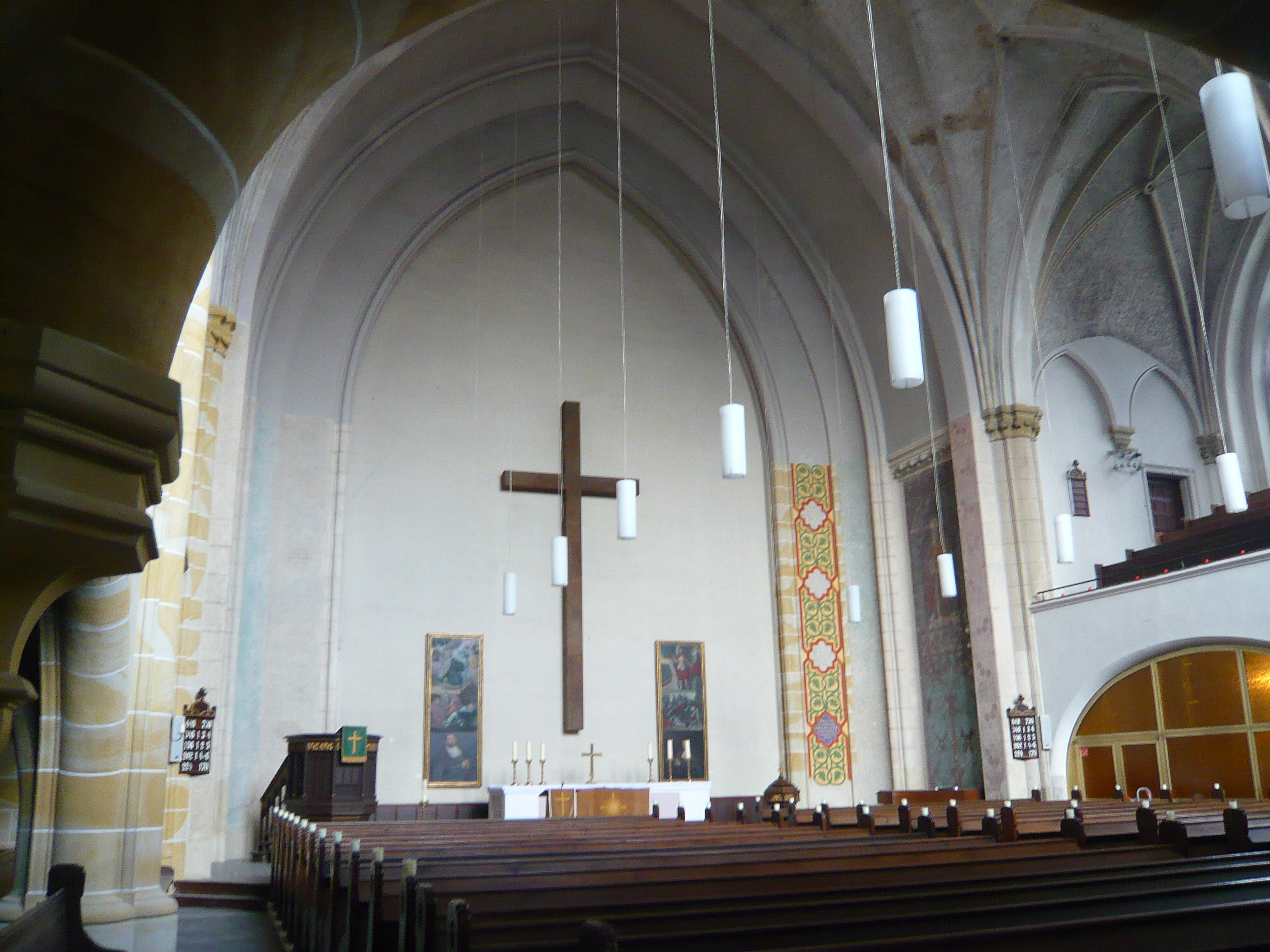 Ortsteil Friedrichshain: Pfingstkirche.